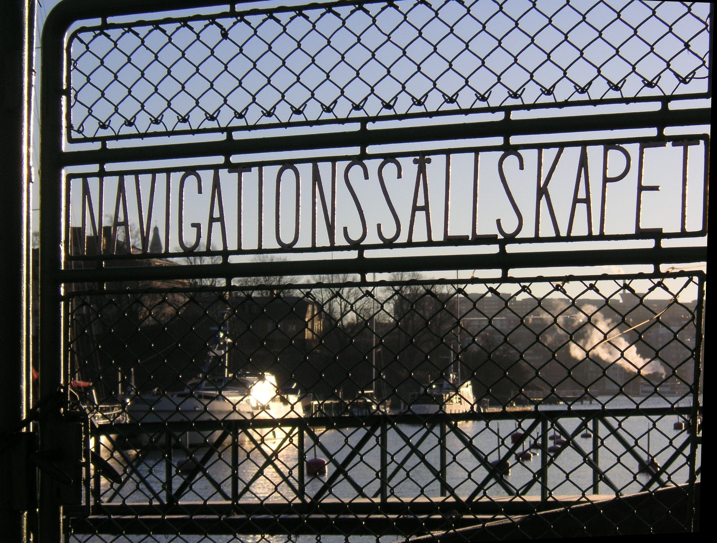 Navigationssällskapet i Stockholm, smidesgrinden mot Ryssviken